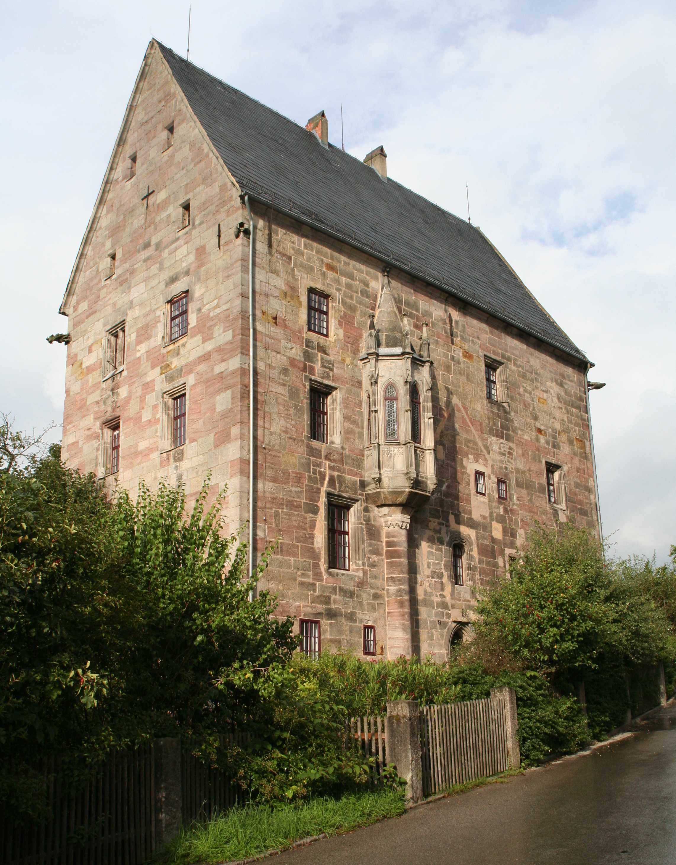 Kloster Mönchröden ehemalige Benediktinerabtei Mönchröden in Rödental, Landkreis CoburgPrälatur 1521